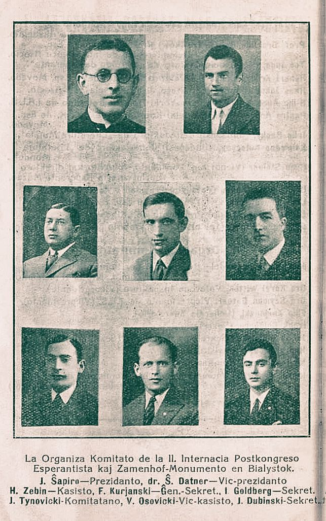 Książka II Międzynarodowego Pokongresowego Spotkania Esperanckiego w Białymstoku, 12-13 VIII 1931. Komitet organizacyjny. Od góry: Jakub Szapiro - Prezes, Szymon Datner - Wiceprezes, Henryk Zebin - Skarbnik, Filip Kurjański - Sekretarz Generalny, I. Goldberg - Sekretarz, Ichiel (Jerachmiel) Tynowicki - Członek Komitetu, Wolf Osowicki - Zastępca Skarbnika, Jakub Dubiński - Sekretarz